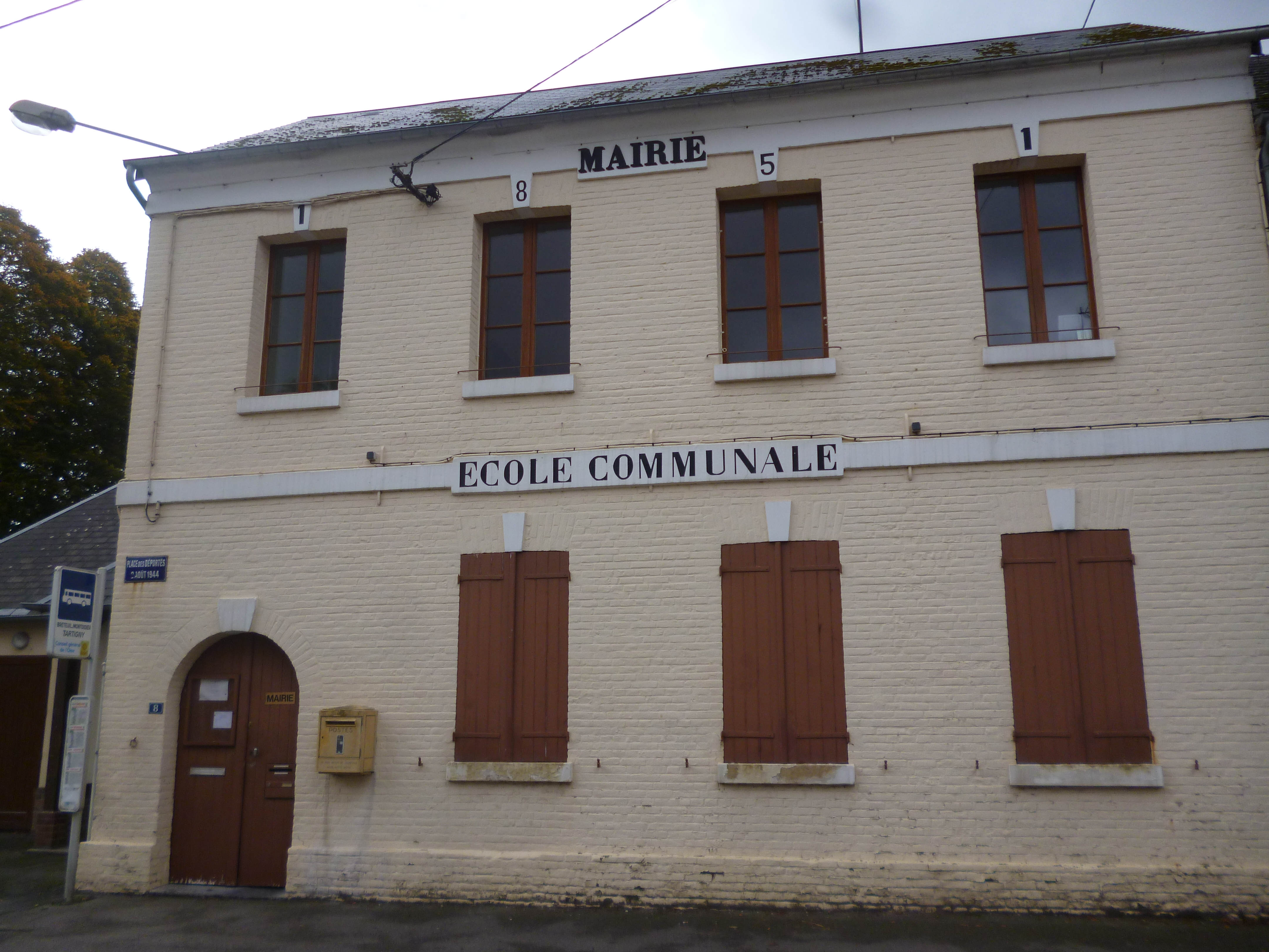 La mairie et l'école de Tartigny (Oise).